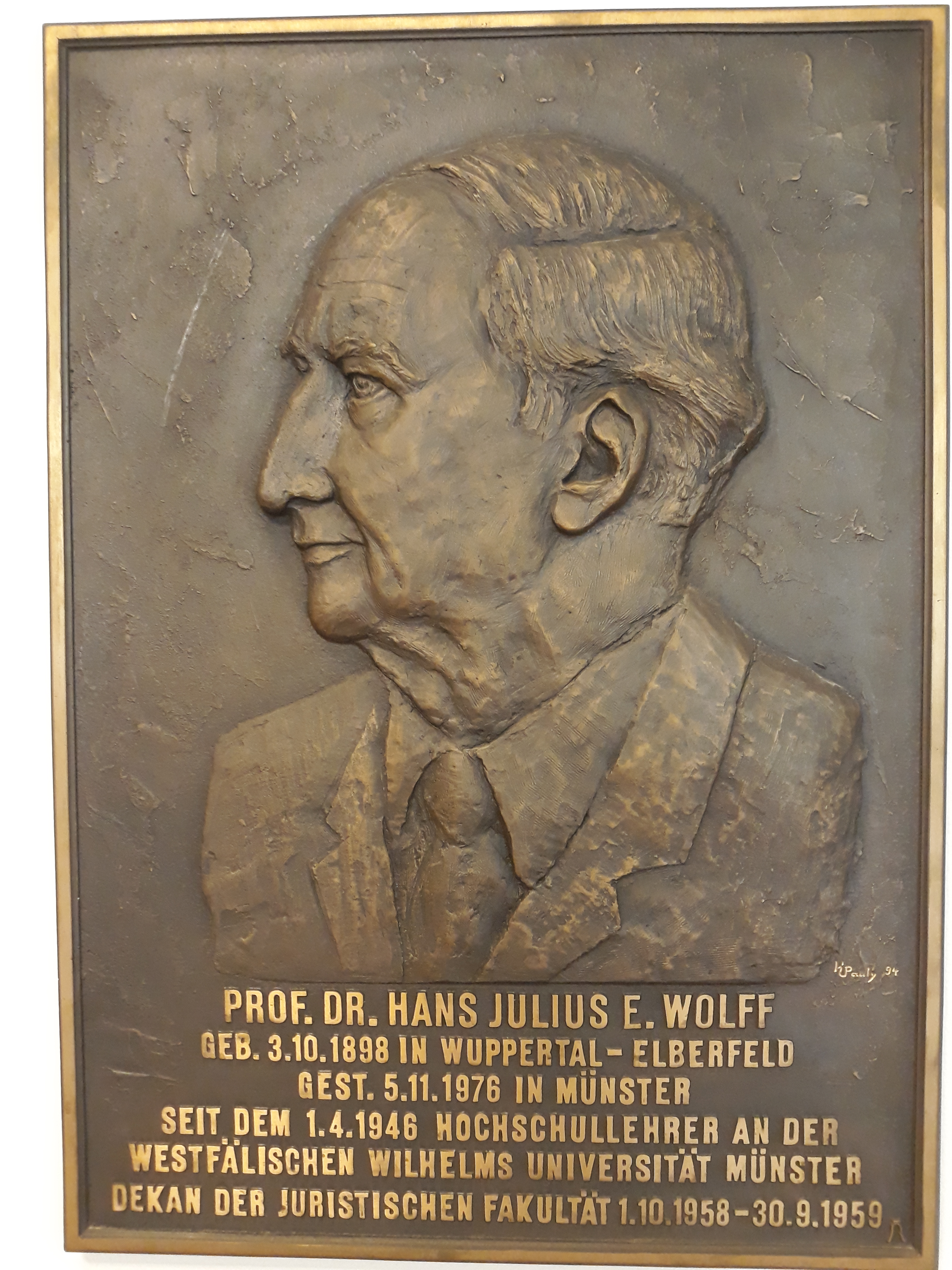 Bronzerelief des deutschen Juristen und Hochschullehrers Hans Julius Wolff im Gebäude der Juristischen Fakultät in Münster.